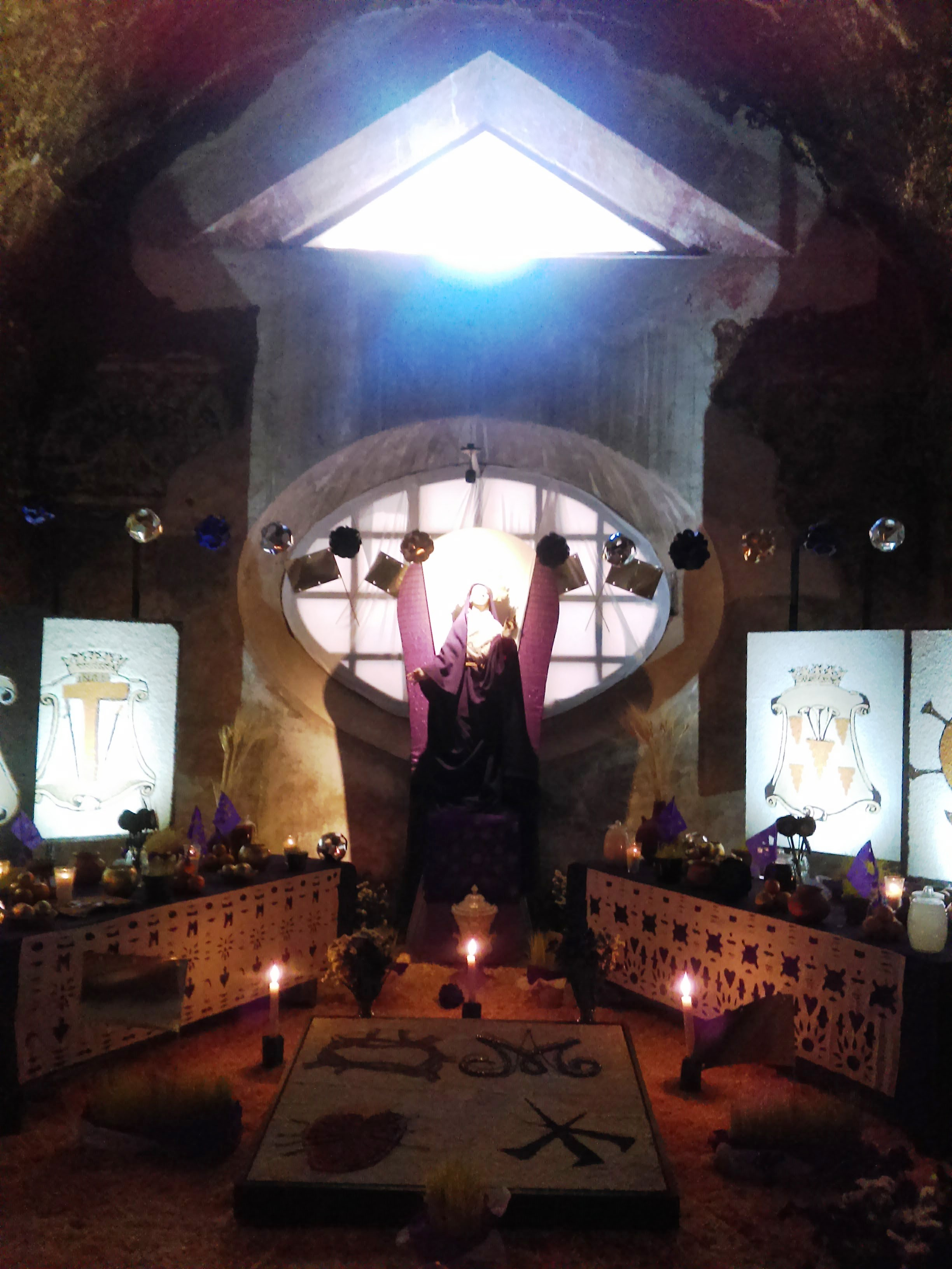 Altar de Dolores en Actopan, Hidalgo, México (2018).